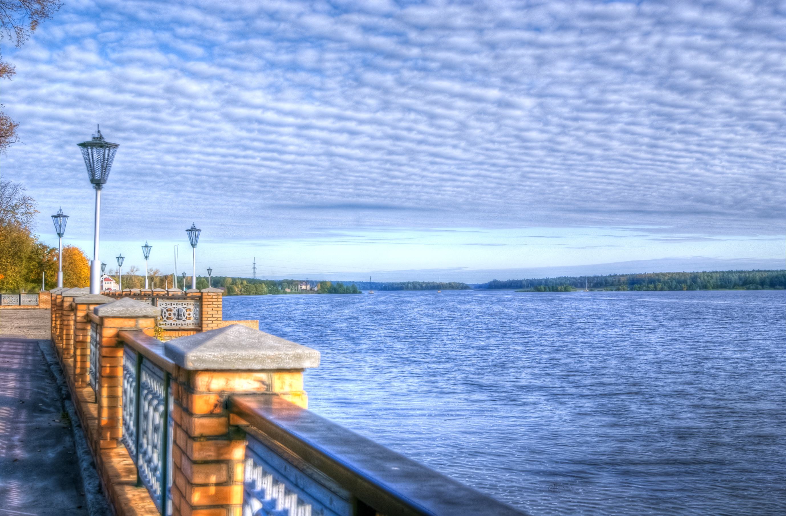 Набережная о. Ломпадь